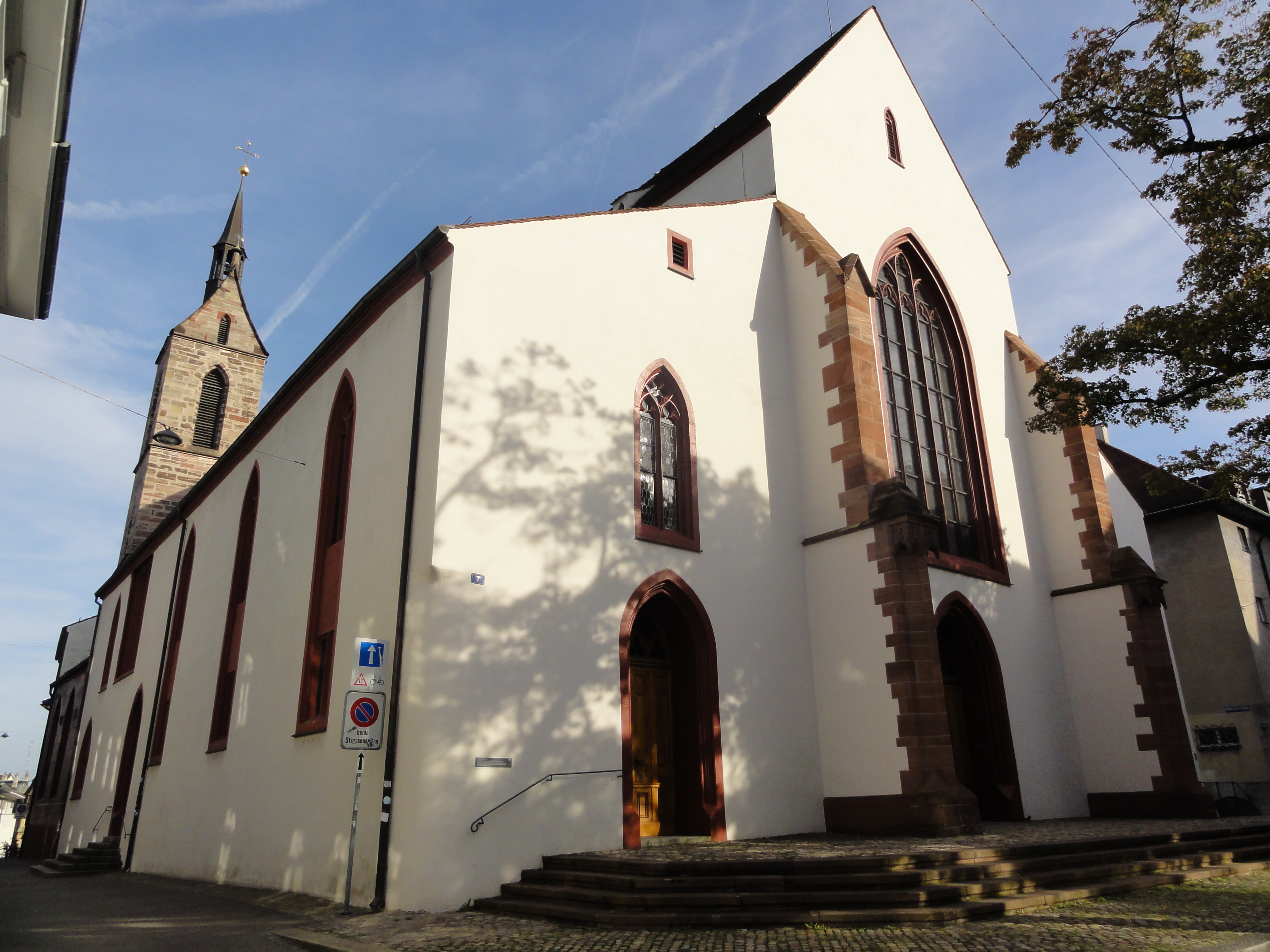 Basel — Petersplatz?